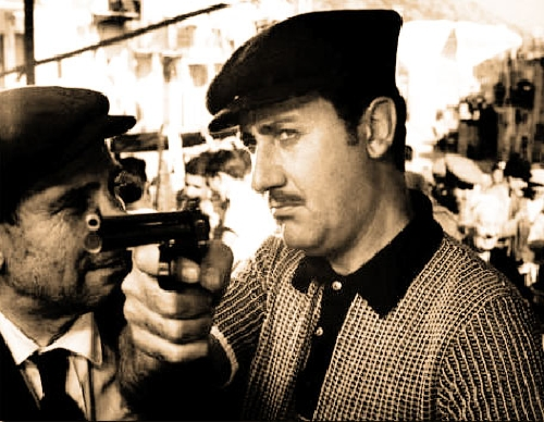 Film del 1962 Licensing Categoria:Immagini di Alberto Sordi